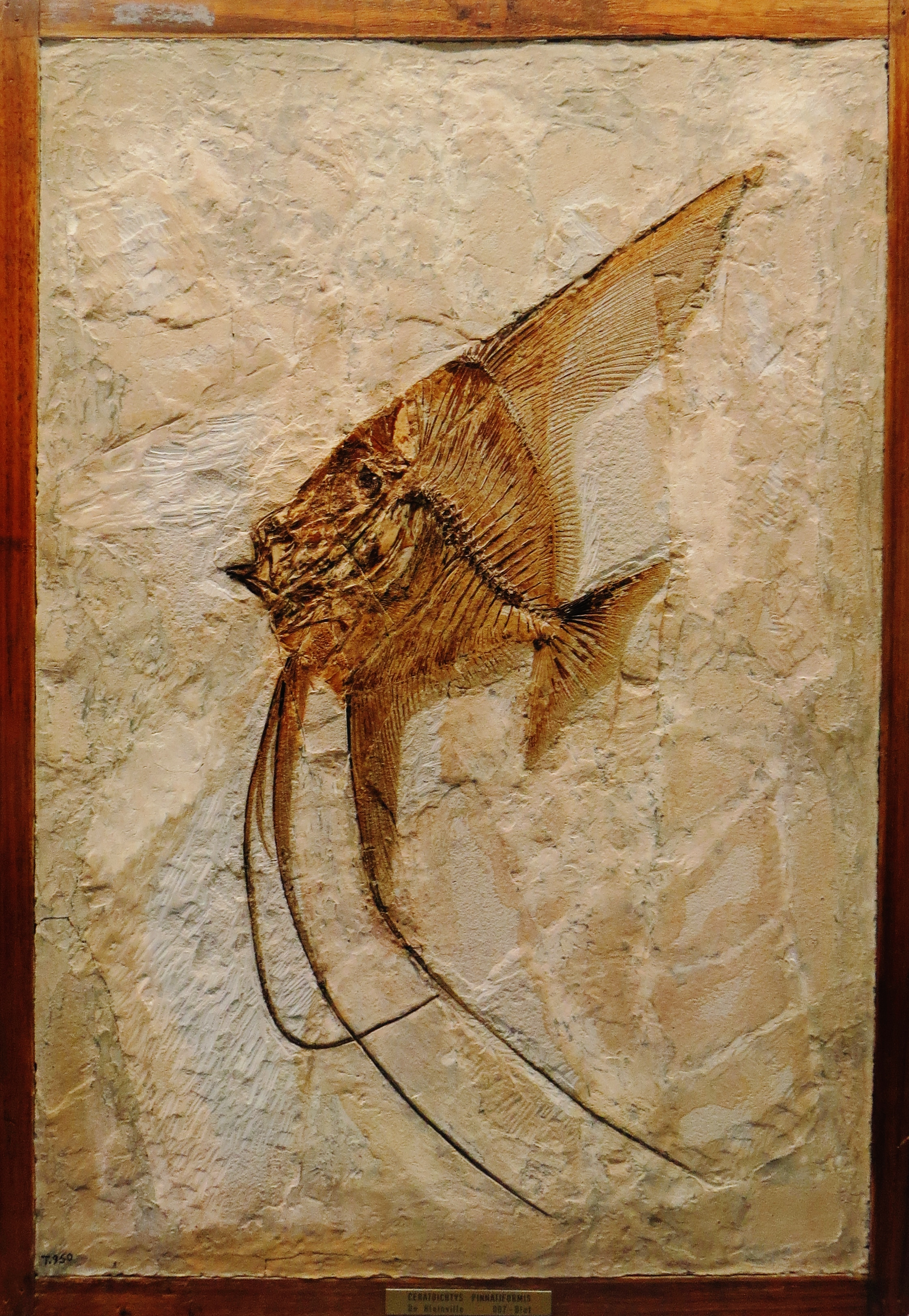 Fossil - Took the picture at Museo di storia naturale di Verona